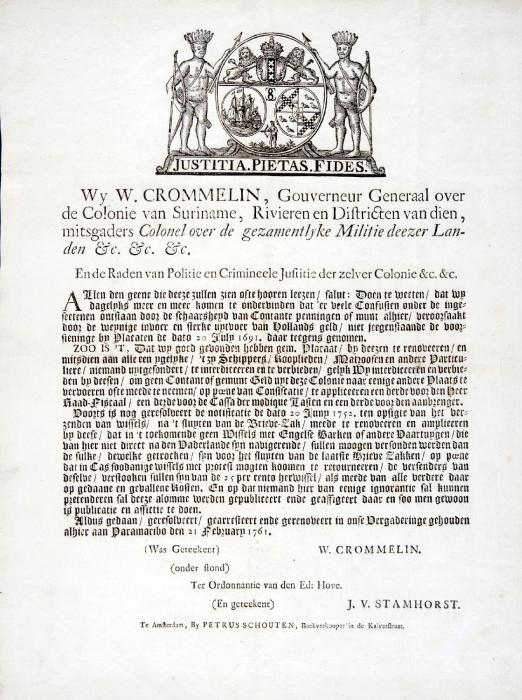 Document. Gedrukte regeringsaankondiging